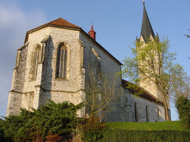 Stolnica svetega Nikolaja, Slovenija, 2001